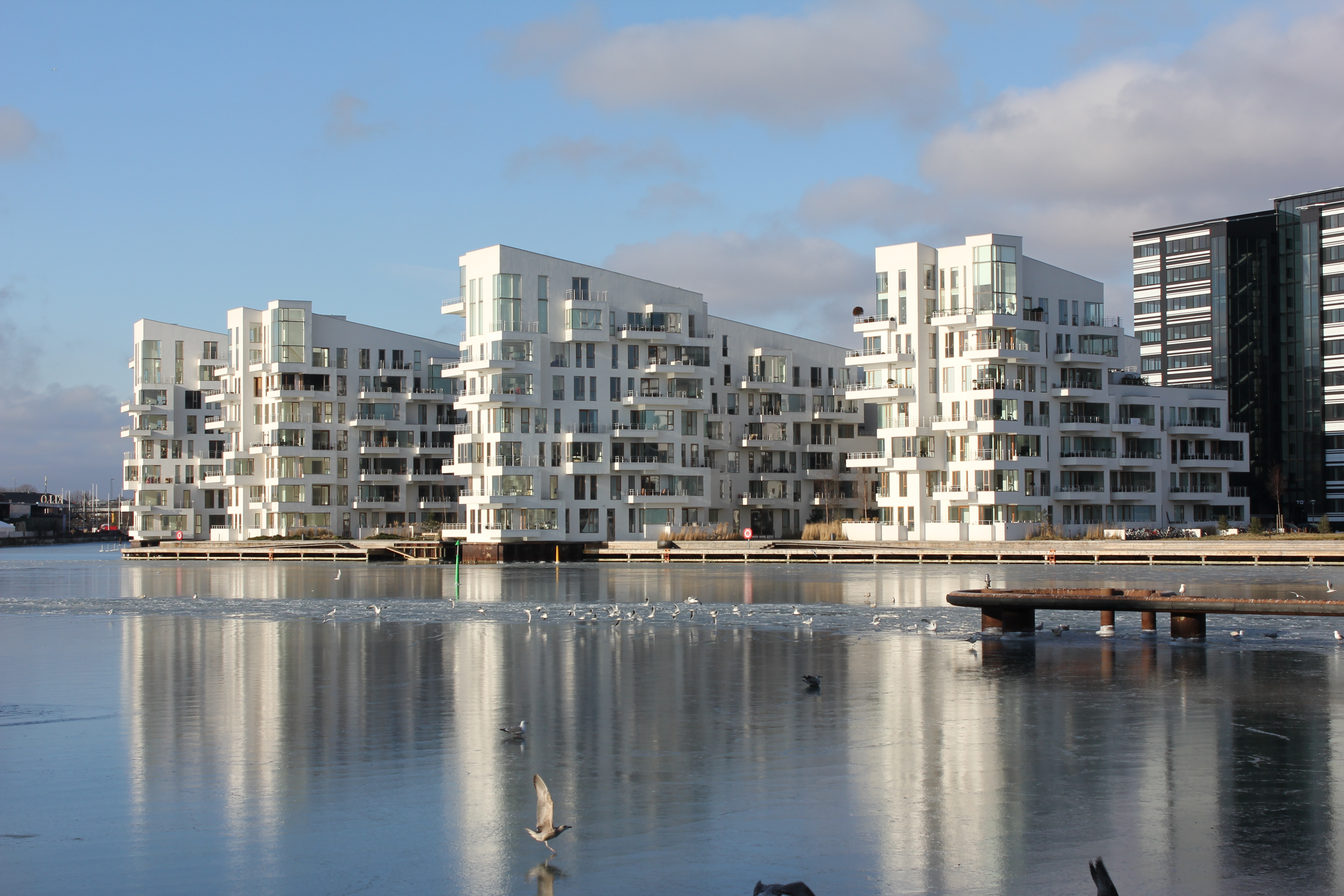 Havneholmen på Kalvebod Brygge i København. Billedet er taget fra Islands Brygge.